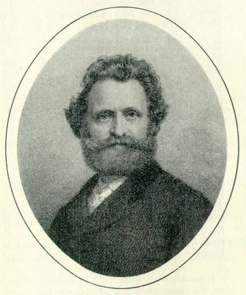 Friedrich Eggers